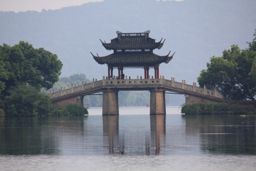 Hangzhou